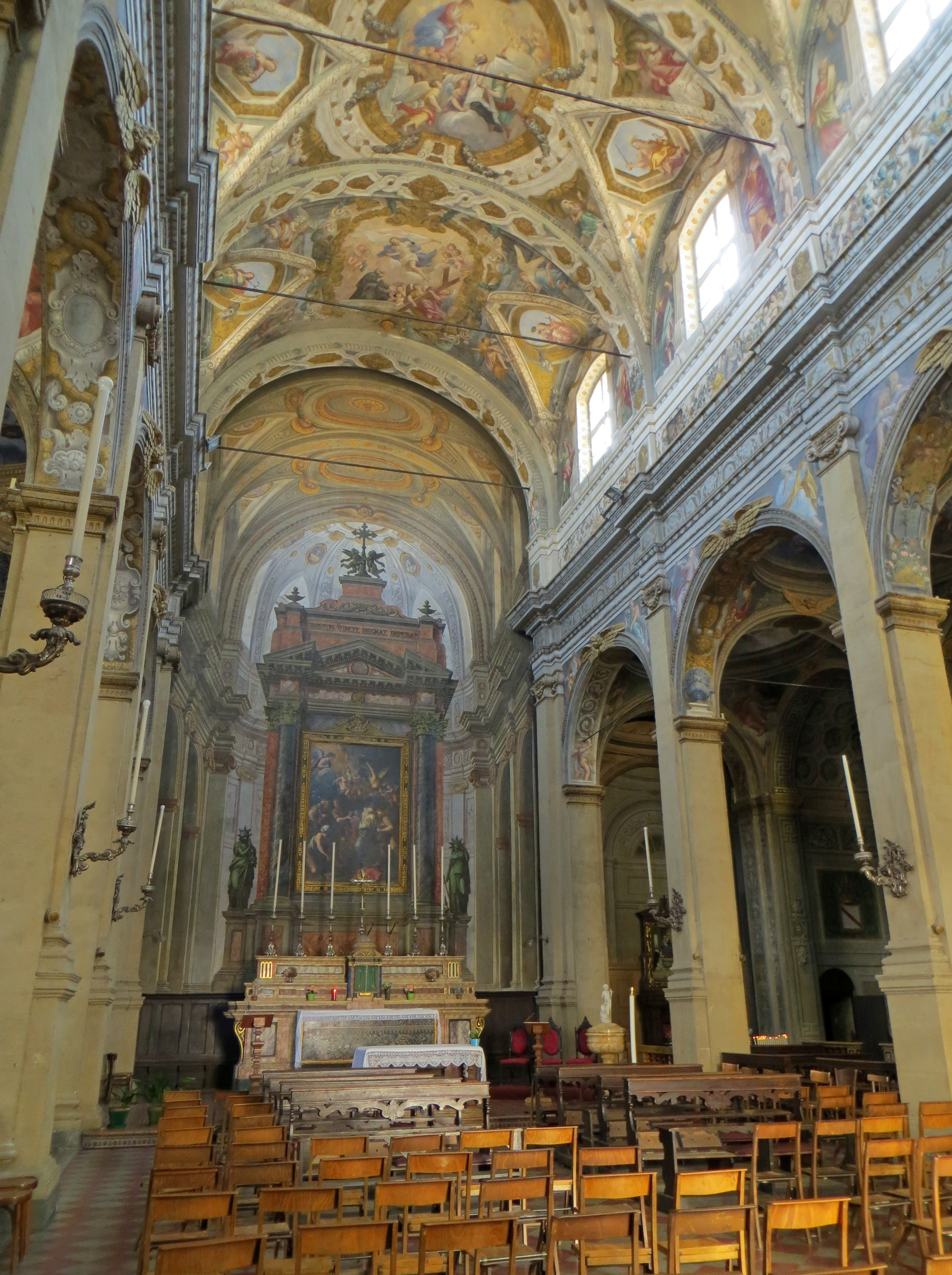 Chiesa di Santa Cristina (Parma) - navata centrale